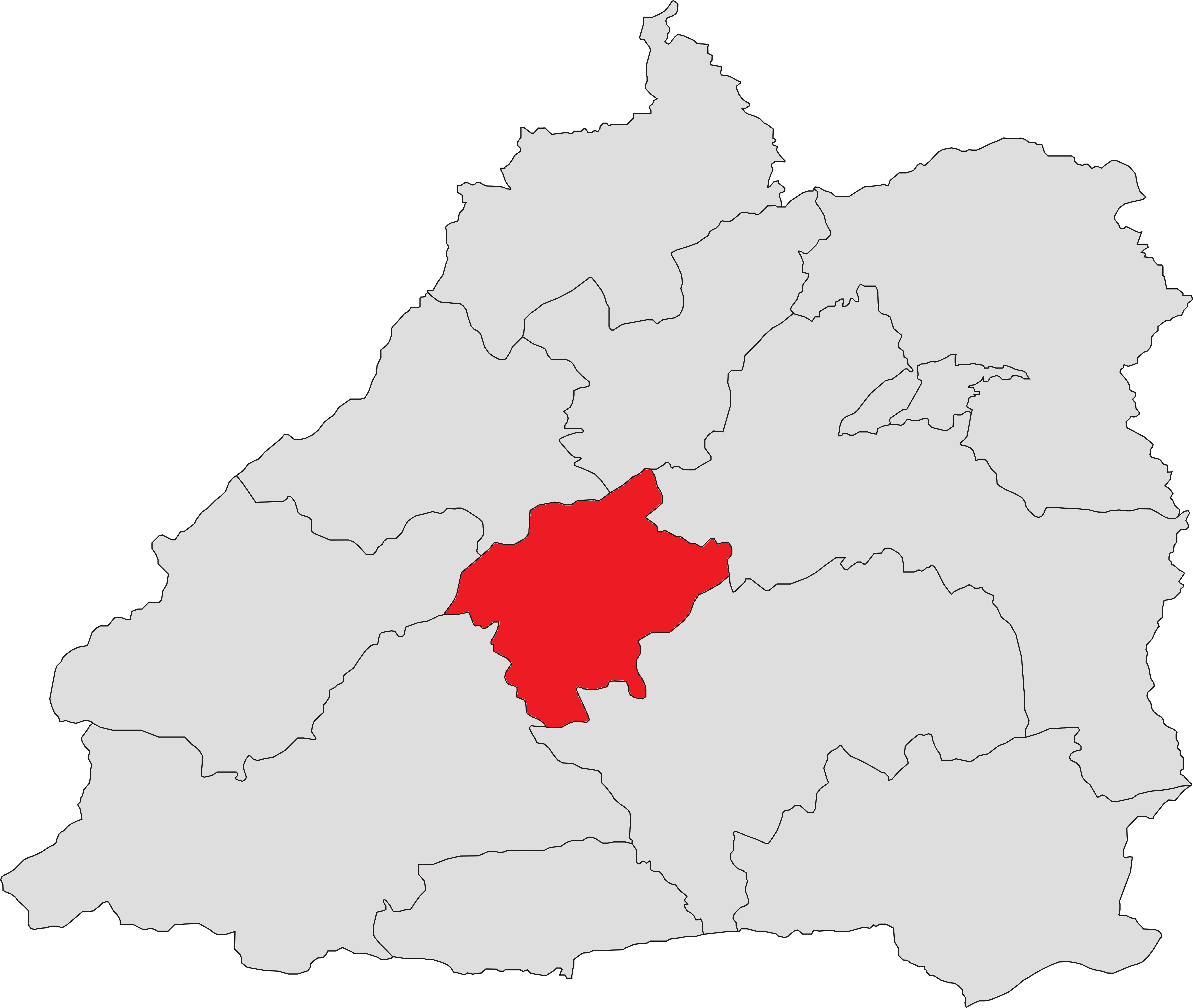 中文（中国大陆）: 芒市三台山德昂族乡位置图